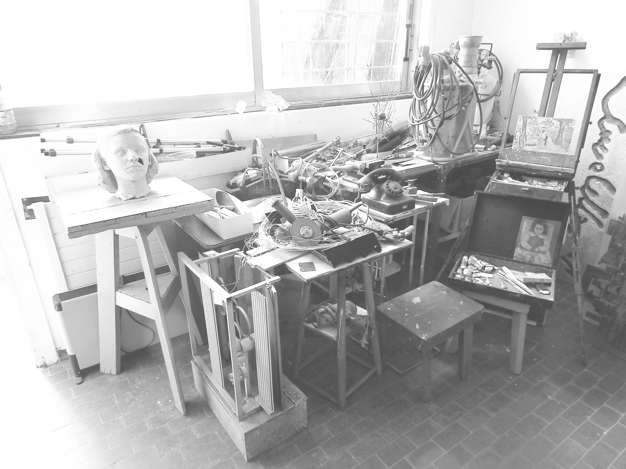 Μέρος του εργαστηρίου του Γιώργου Ζογγολόπουλου.